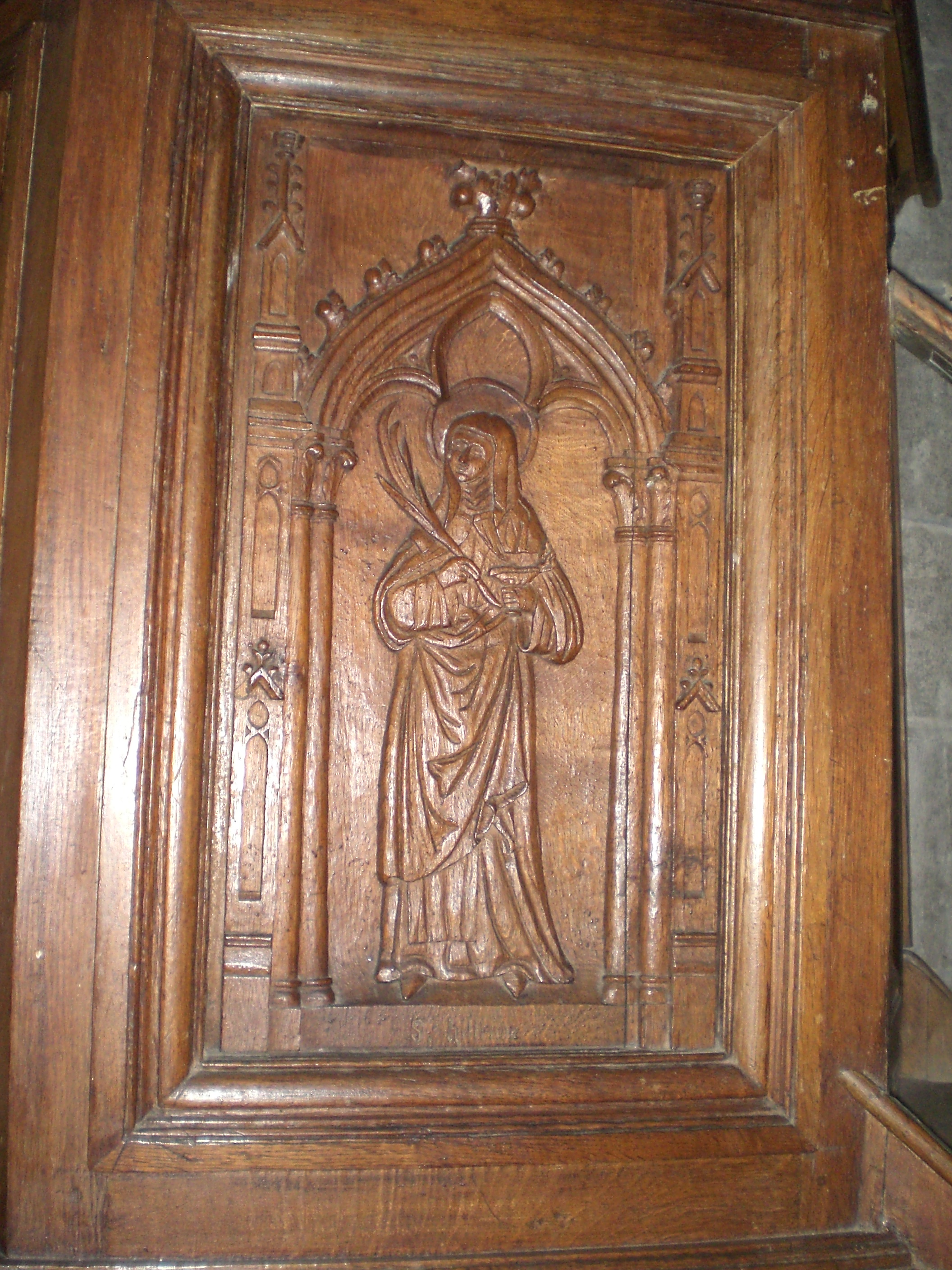 representation de saint hiltrude dans l'eglise de ramousies sur la chaire